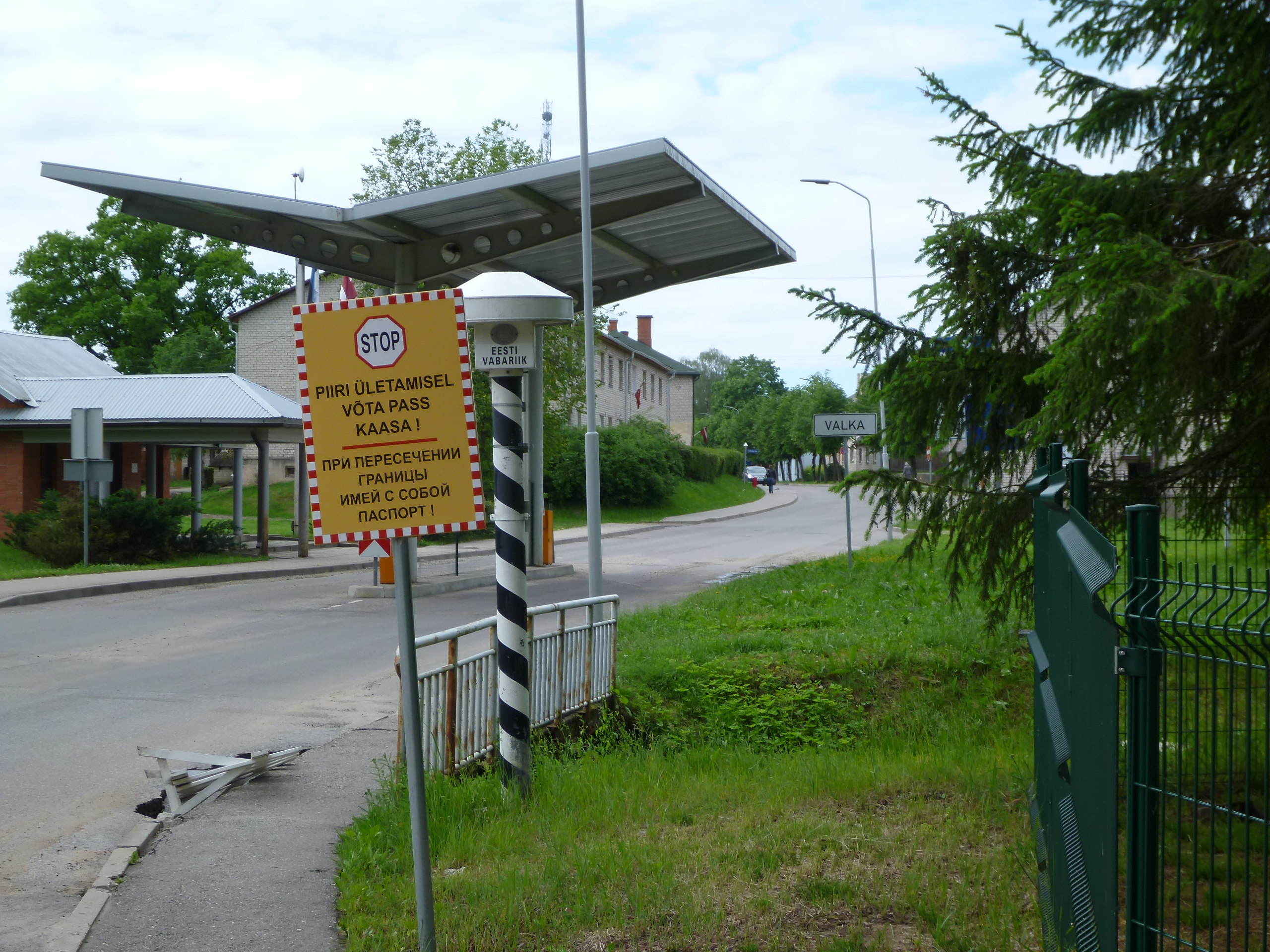 Valkan ja Valgan raja Viron puolelta kuvattuna